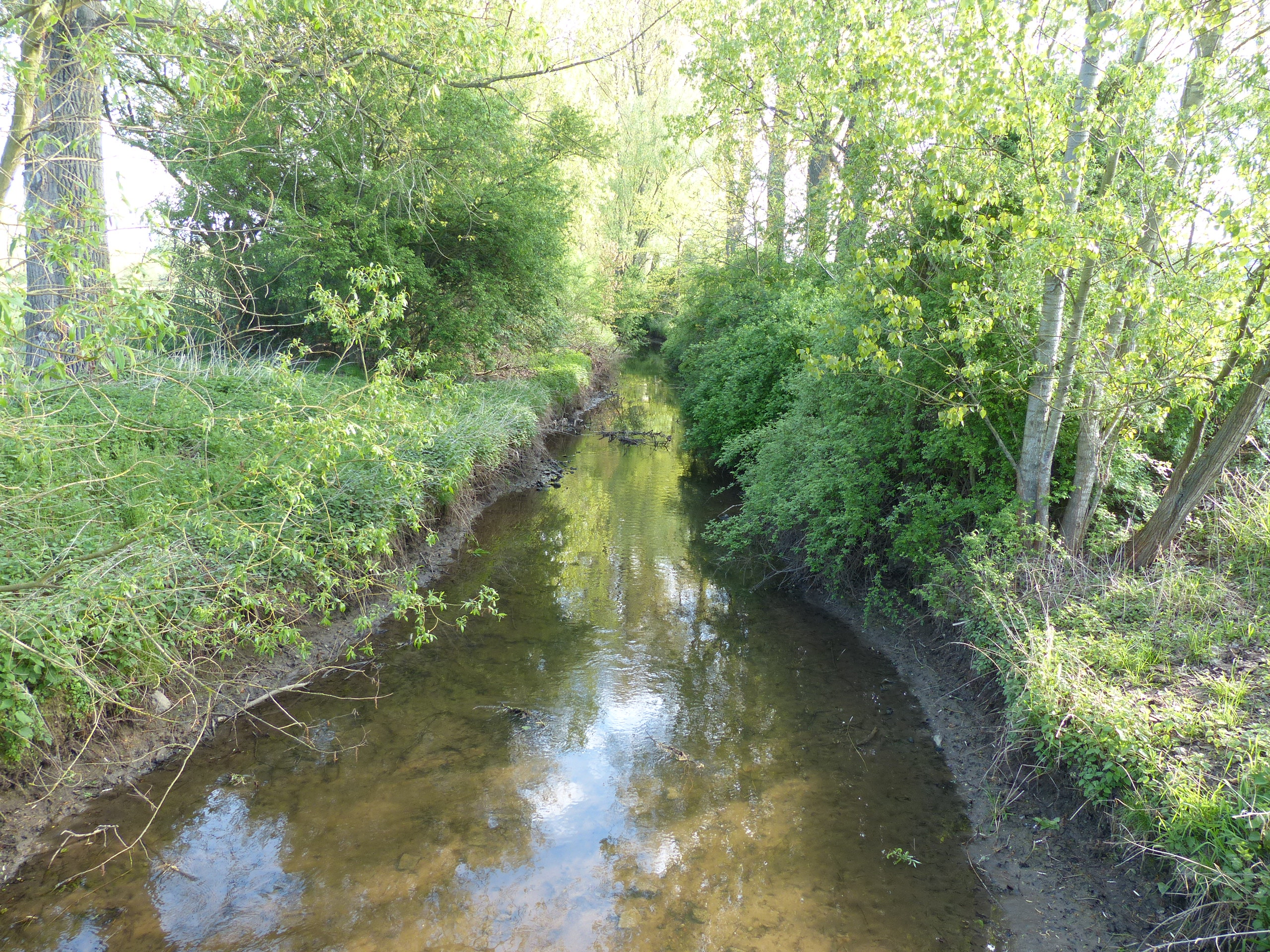 Horloff westlich von Utphe April 2014